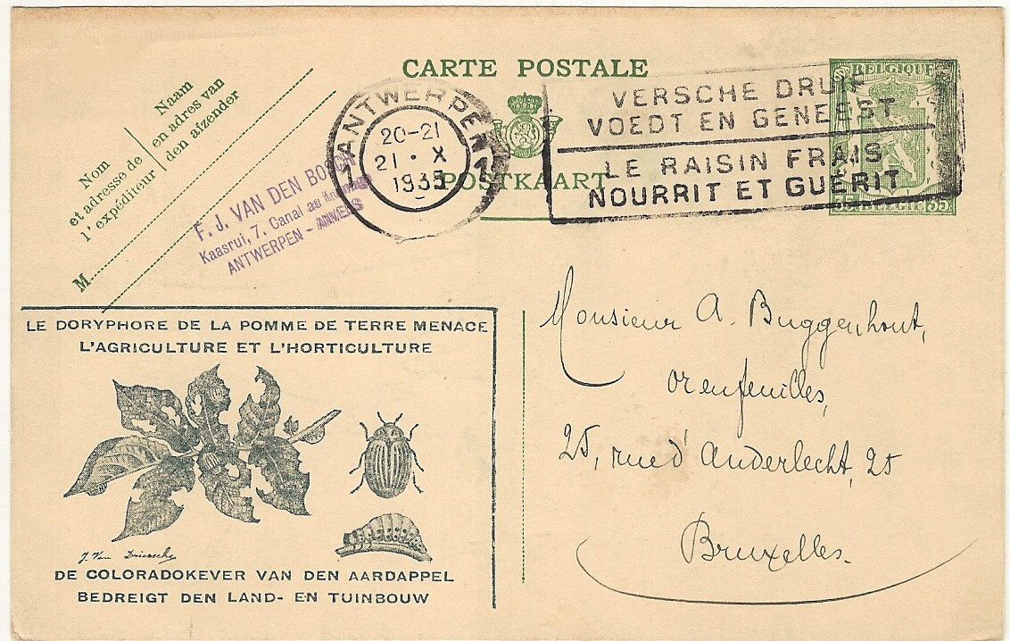 Carte postale émise en Belgique en 1935 avec un dessin du doryphore de la pomme de terre (Leptinotarsa decemlineata)